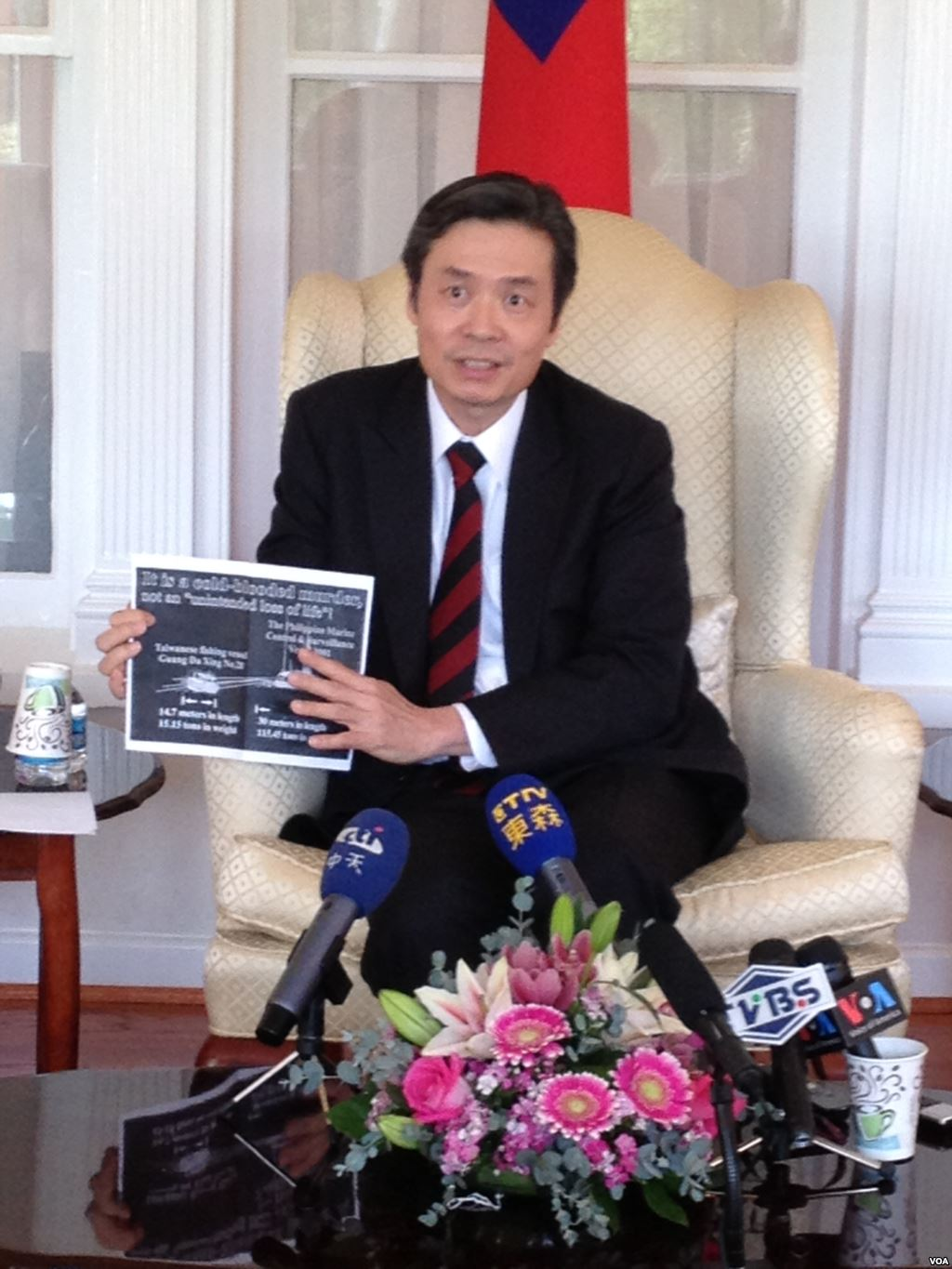 中華民國駐美國代表金溥聰出示廣大興28號與菲律賓公務船對照圖。